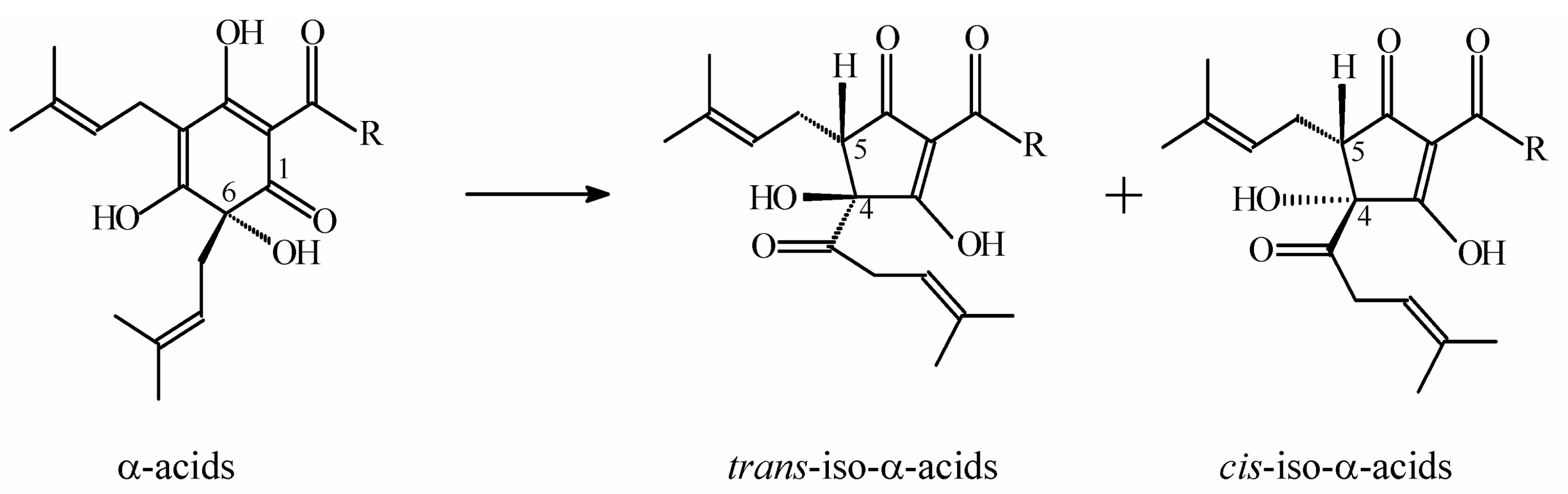 Isomering af alfasyre